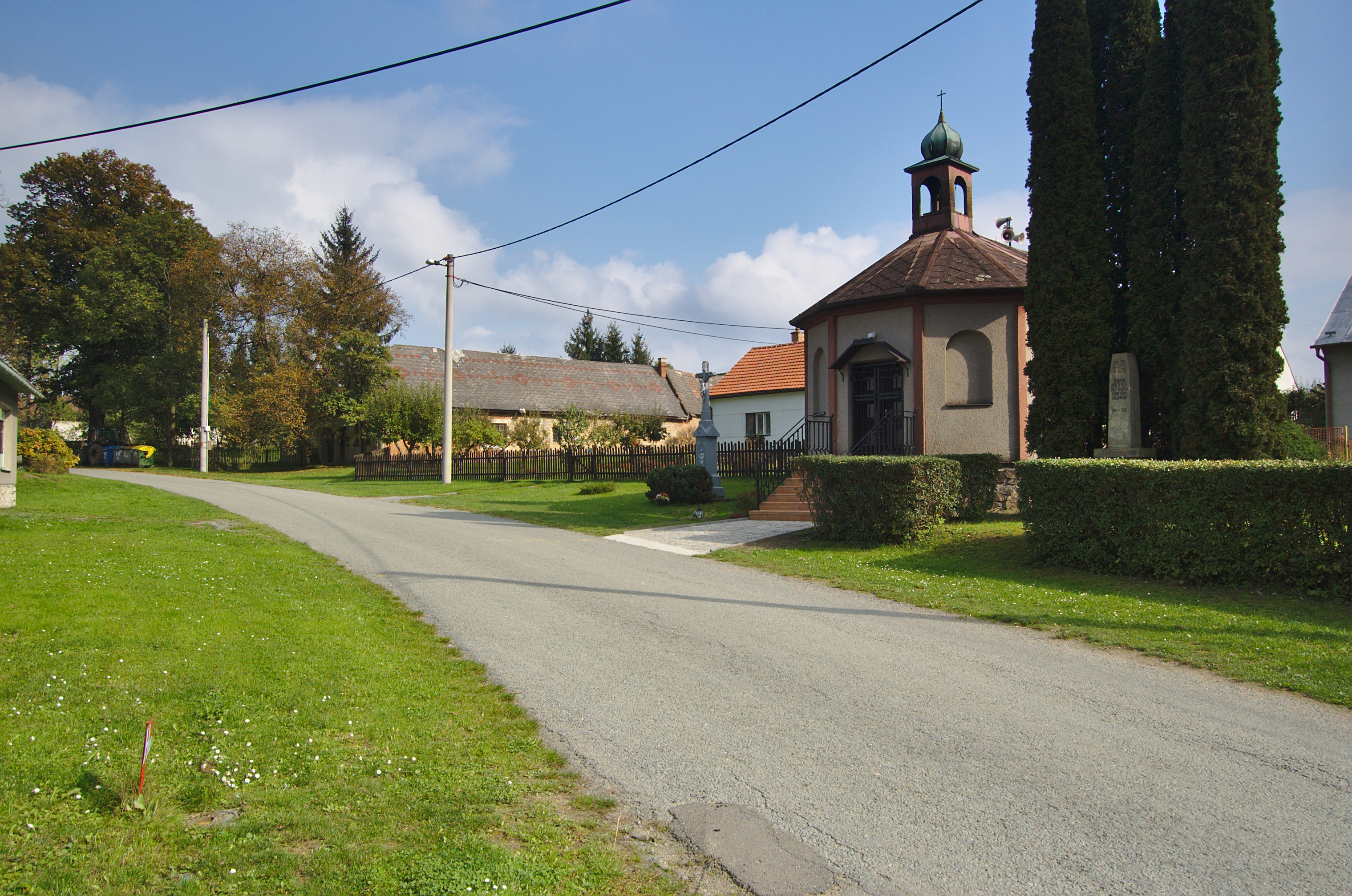 Kaple, Hartinkov, okres Svitavy